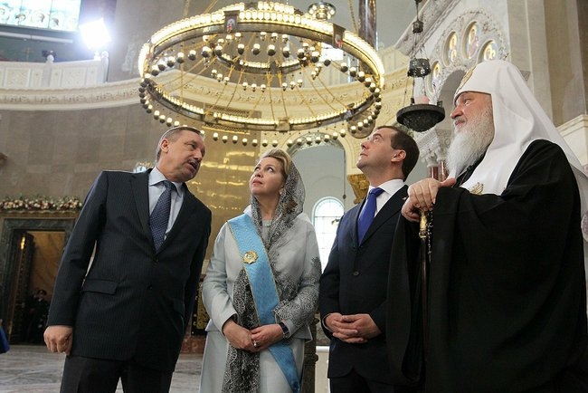 Во время осмотра Никольского морского собора. Слева направо: Заместитель Руководителя Администрации Президента Александр Беглов, Светлана Медведева, Дмитрий Медведев, Патриарх Московский и всея Руси Кирилл